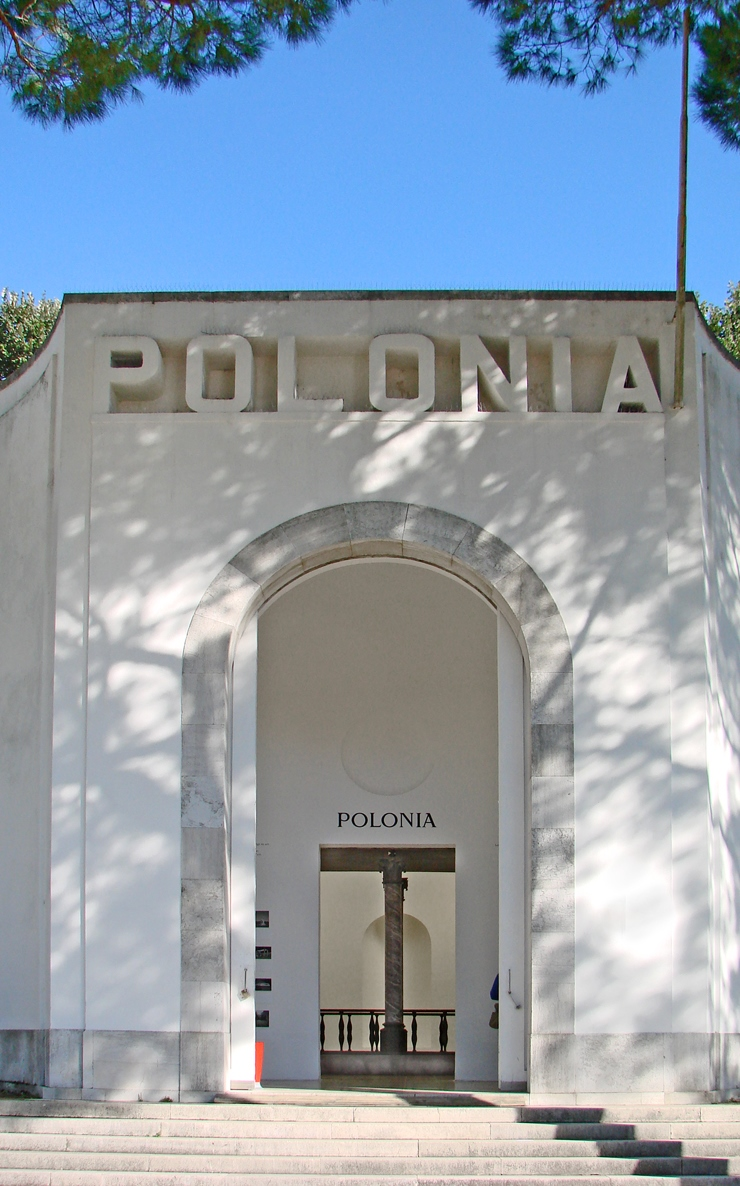 Entrée du pavillon national de la Pologne Le pavillon de la Pologne se trouve dans les jardins de la Biennale situés sur l'île San Elena comme les pavillons de l'Autriche, de la Serbie, de l'Egypte, du Brésil, de la Grèce, de la Roumanie et de la cité de Venise. Photo Annie Dalbéra Le projet du pavillon polonais traite des relations complexes qui existent entre la politique et le modernisme dans le contexte de la renaissance de l'état polonais après 1918. Il a été inspiré par le baldaquin situé au-dessus de l'entrée de la crypte où se trouve notamment le tombeau du grand dirigeant polonais : Josef Pilsudski (1867-1935). La crypte et le baldaquin ont été conçus en 1937 par Adolf Szyszko-Bohusz dans un style moderniste (le toit du baldaquin) classique (les colonnes et le socle). Ils se trouvent dans la cathédrale située sur la colline de Wawel à Cracovie. Chaque partie du baldaquin est constituée d'éléments ou de matériaux provenant de prises de guerre sur les pays qui ont dominé la Pologne avant 1918 : la Prusse, l'Autriche-Hongrie et la Russie tsariste. Sur le toit du baldaquin qui semble ne pas reposer sur les colonnes, on peut lire l'inscription : "Corpora dormiunt, vigilant animae" (le corps dort mais l'âme est vigilante), symbole de l'indépendance retrouvée de la Pologne après la partition et de l'unité "monolithique" de la nation. L'Institut d'architecture polonais a reconstruit ce baldaquin, à l'échelle 1, en détachant le toit plat des colonnes porteuses pour qu'il paraisse réellement flotter dans les airs, afin d'interroger les fondements de la reconstruction de l'identité nationale polonaise et les rêves qu'elle a engendrés.